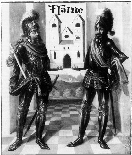 Antica incisione ritoccata